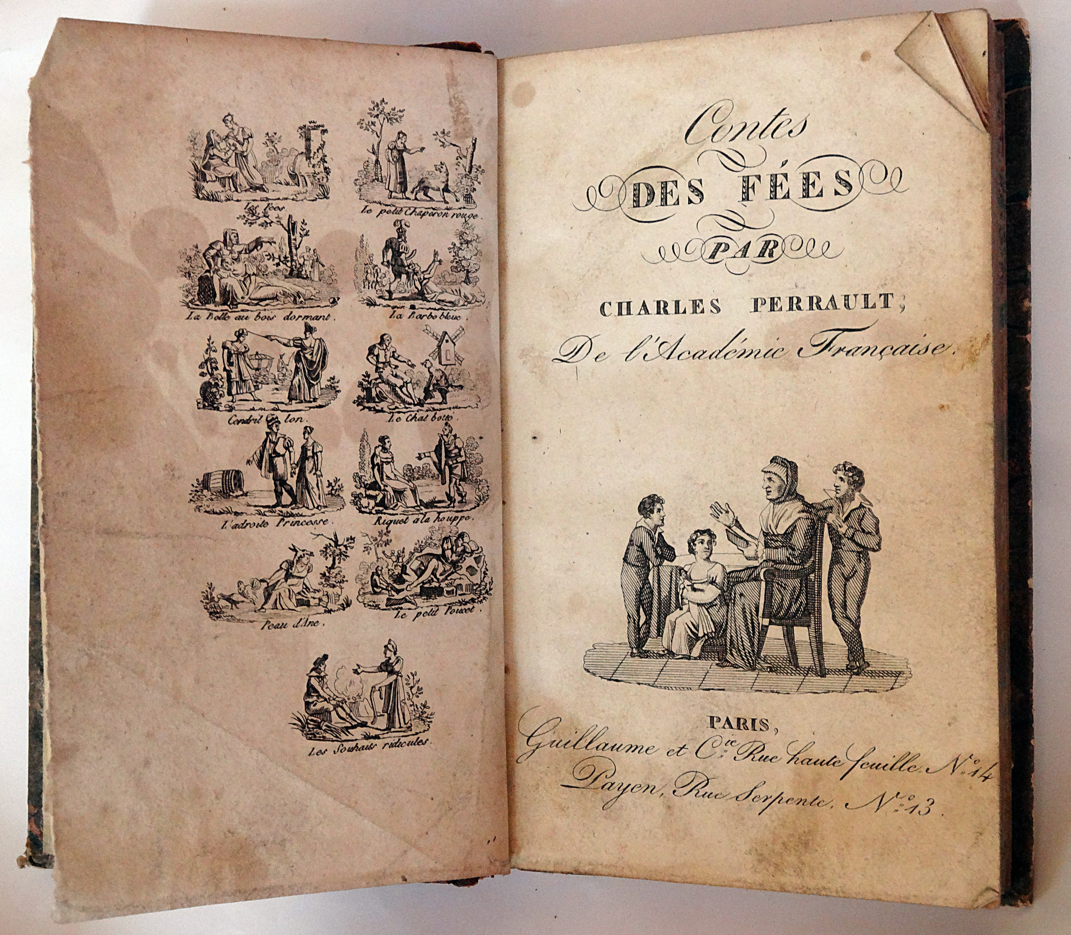 Frontispice des contes des fées de Charles Perrault. Guillaume et compagnie éditeur.